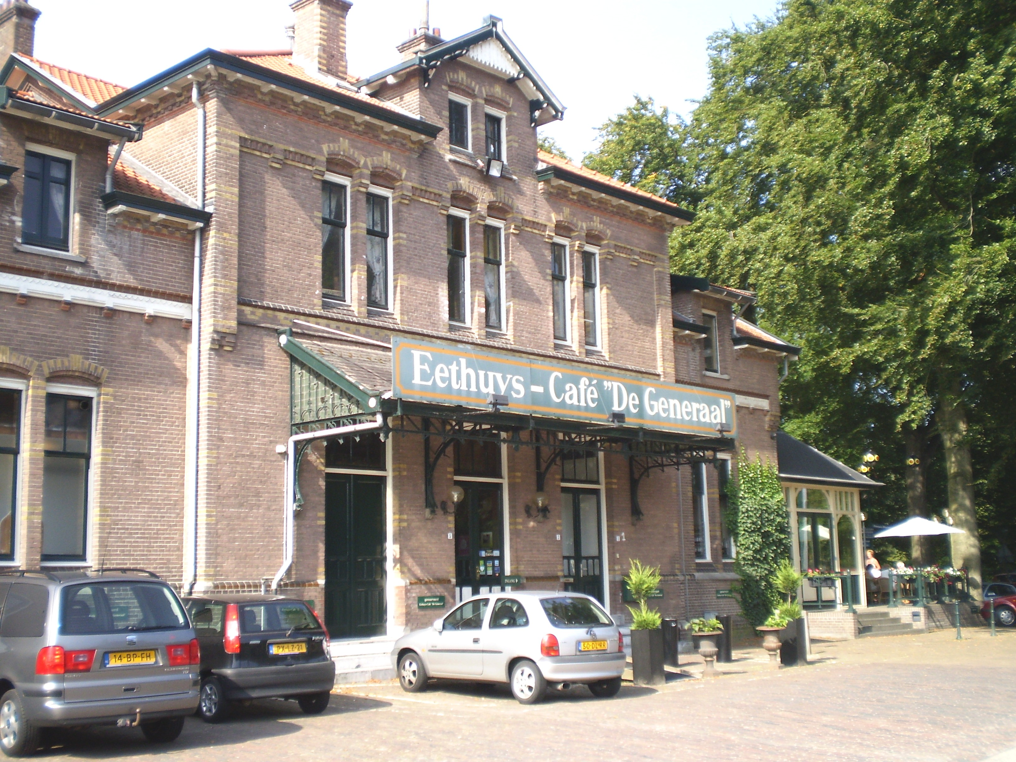 Voormalig Station Baarn Buurtstation. Heden café/eethuis De Generaal in Baarn.